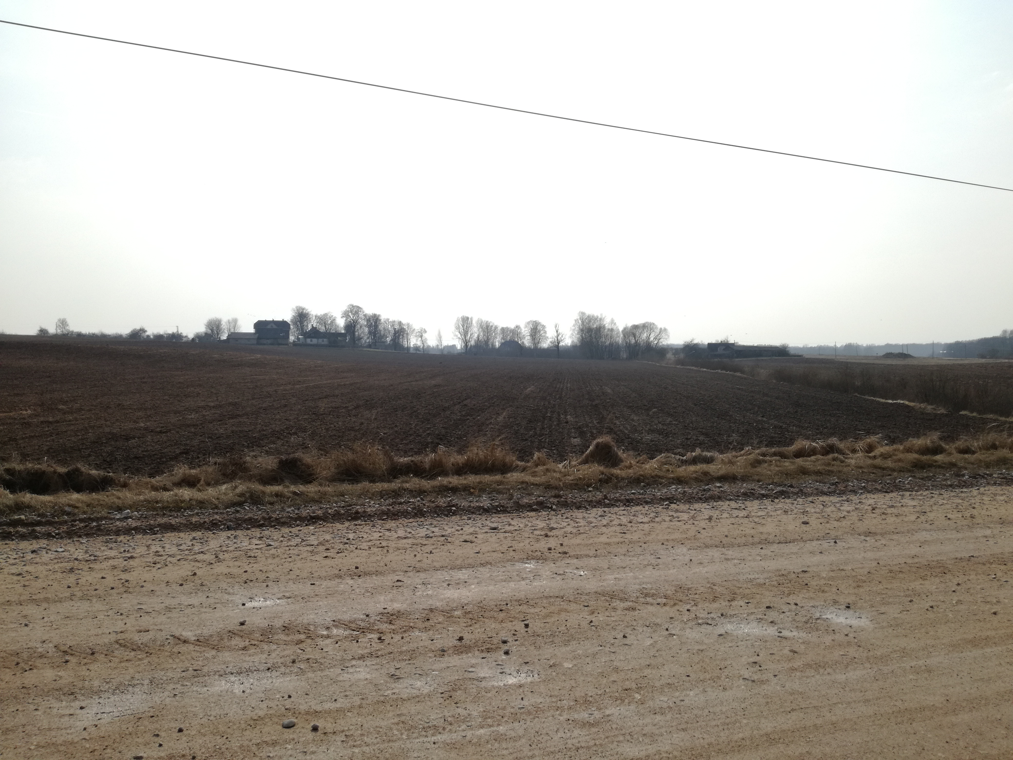 Skats uz Aizpuri